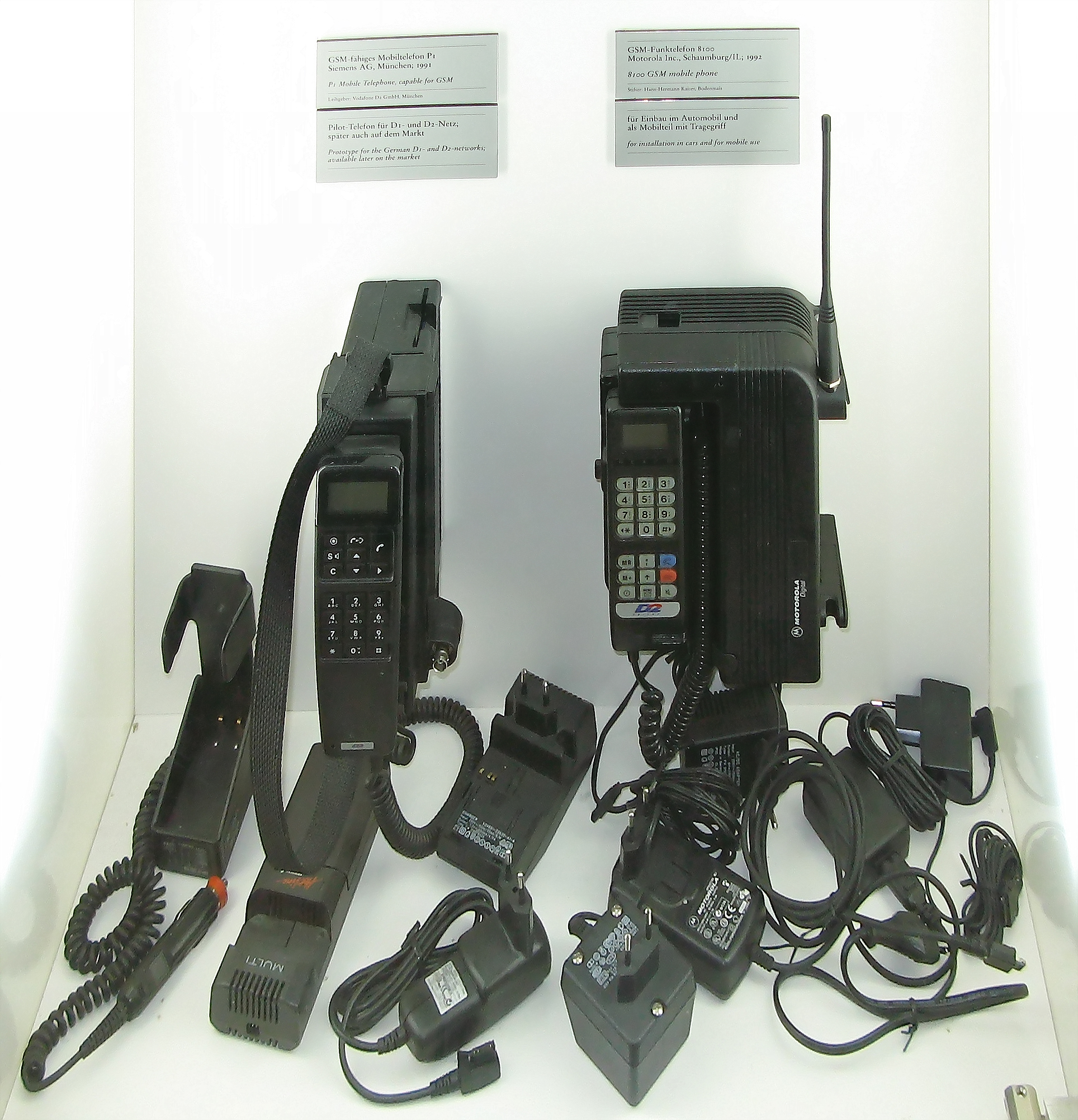 GSM-Mobiltelefone der ersten Generation, Baujahr 1991 fotografiert im Deutschen Museum in München